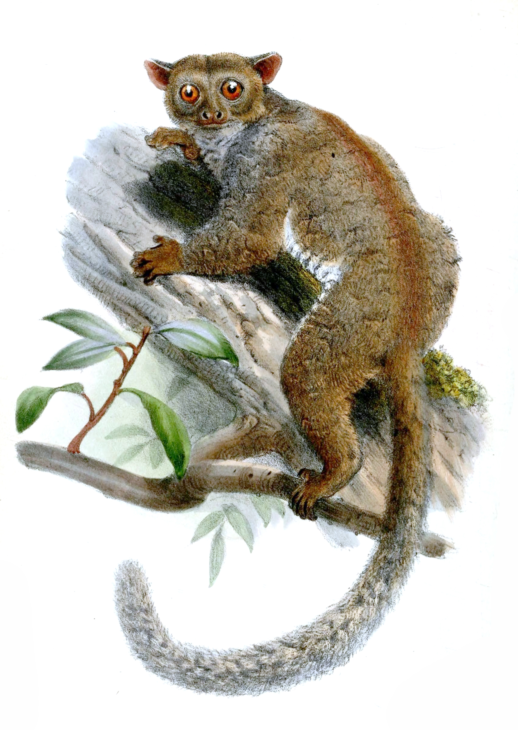 Otogale pallida =Euoticus pallidus